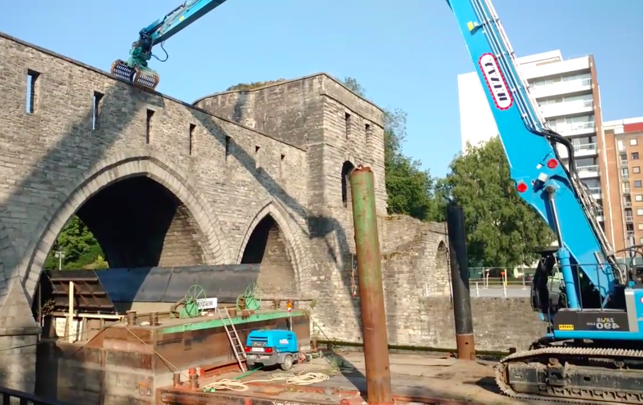 Pont des Trous tijdens het afbreken ervan